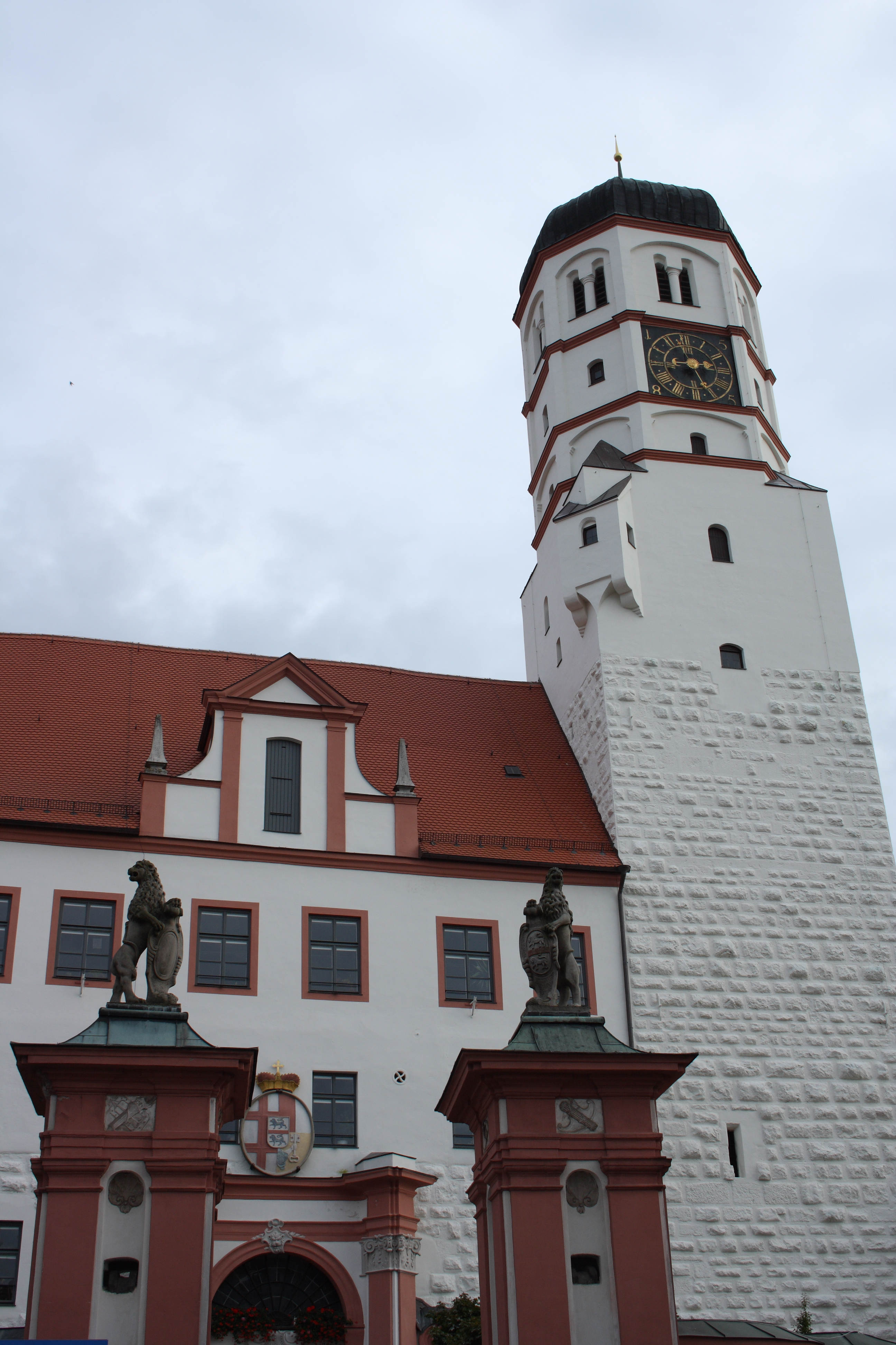 Schloss in Dillingen an der Donau (Bayern), Eingang mit Wappen